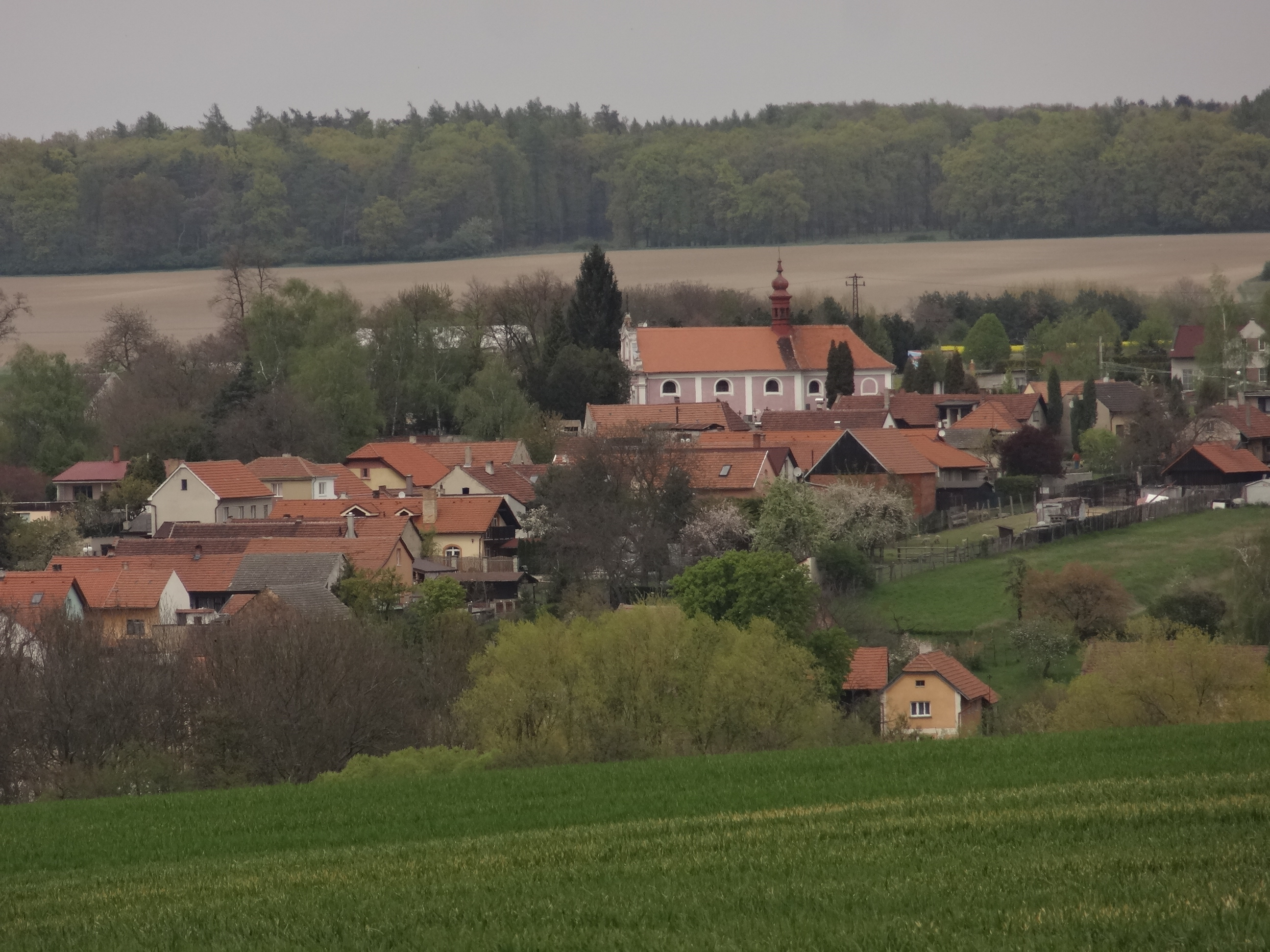 Byšice - celkový pohled na městečko od jihu z polí "U starého mlýna" východně od silnice Byšice-Čečelice, na návrší kostel sv. Jana Křtitele